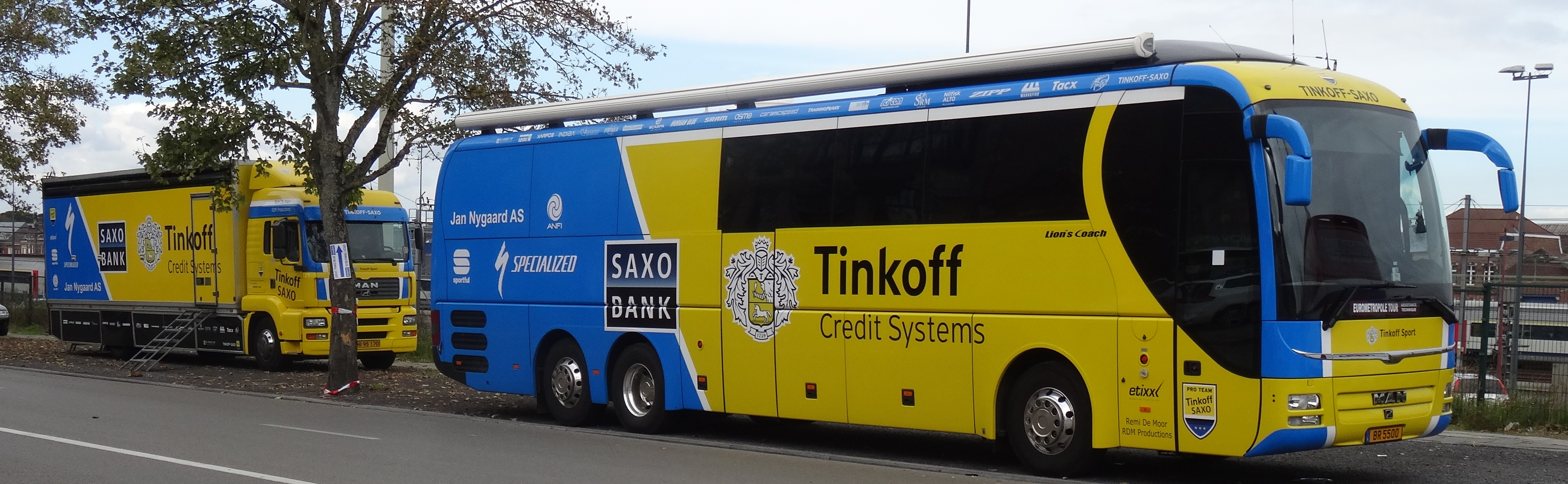 Reportage photographique réalisé le dimanche 5 octobre à l'occasion de l'arrivée de la quatrième étape de l'Eurométropole Tour 2014 à Tournai, Belgique.